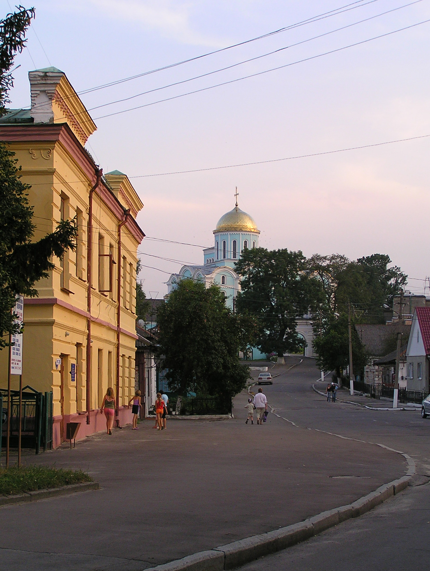 Будинок у якому знаходився повітовий ревком, вул. Соборна, 14, (на фото ліворуч), м. Володимир-Волинський